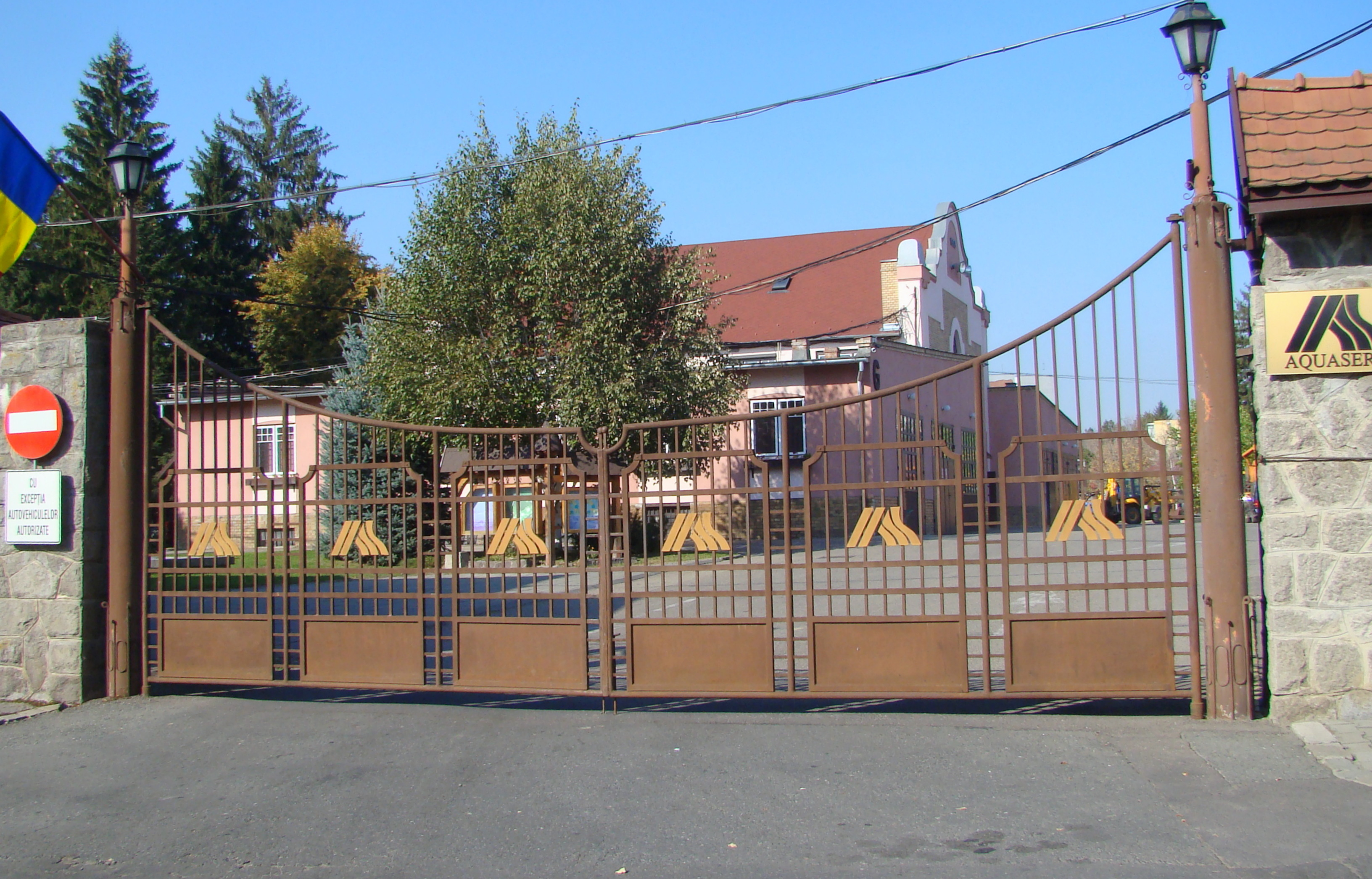 Fostul ansamblu al administrației Uzinelor Comunale, azi R. A. Aquaserv și S.C. Energomur S.A., municipiul Târgu Mureș Str. Kos Karoly 1A și 1 B 1910 - 1913